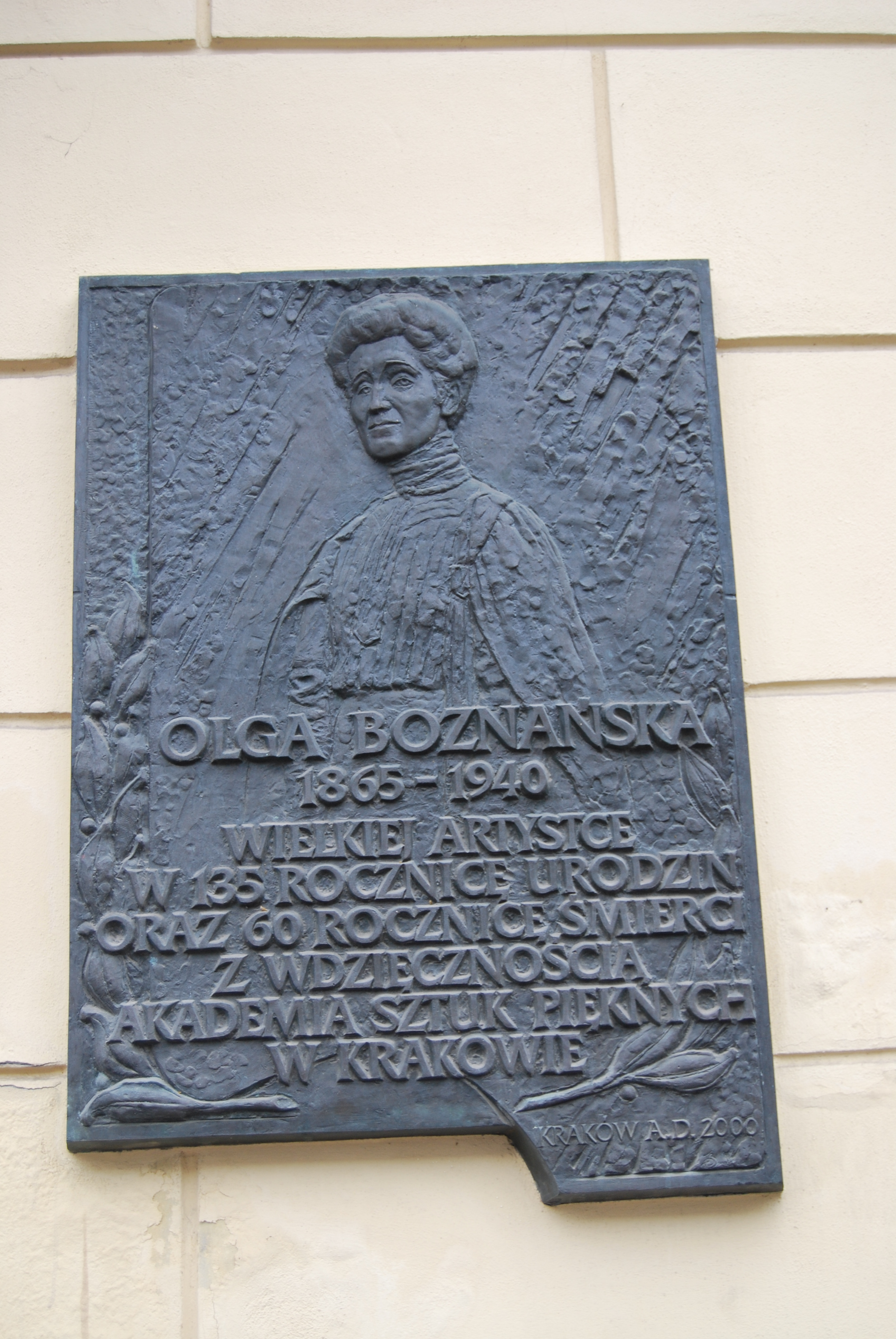 Tablica poświęcona Oldze Boznańskiej . Kraków